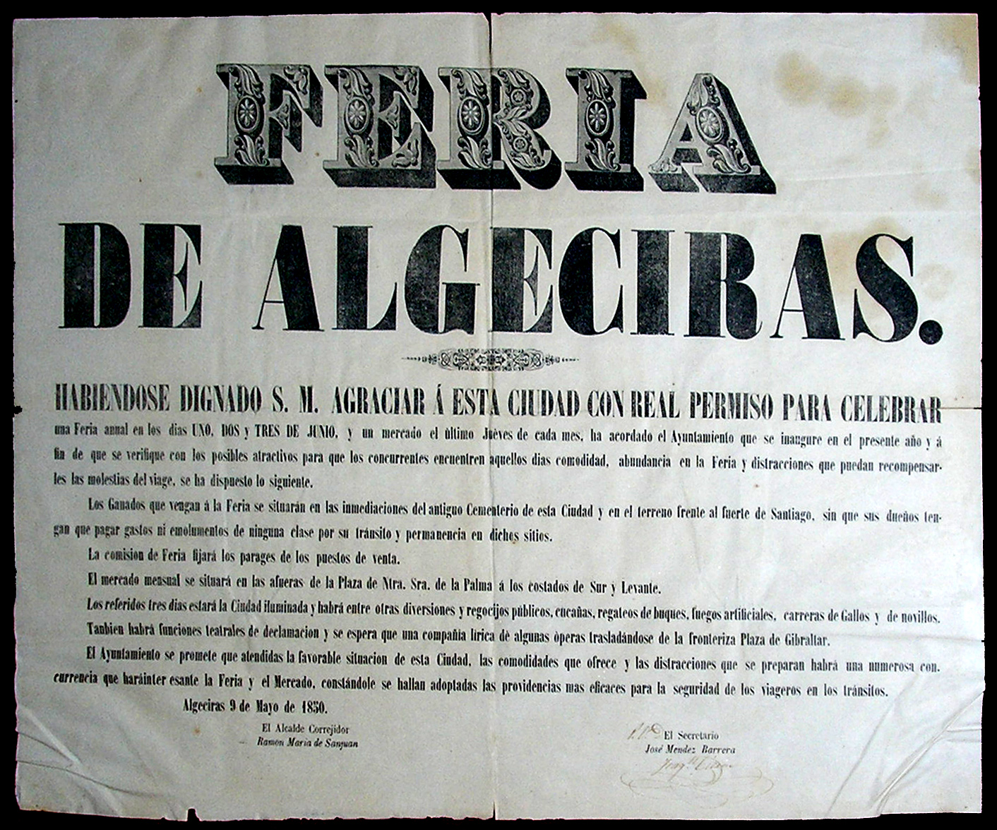 Primer cartel de feria de Algeciras fechado en 1830. Esta obra se encuentra depositada en el museo municipal de Algeciras. Fotografía realizada en abril de 2008 para wikimedia. En el texto se lee: «FERIA DE ALGECIRAS HABIENDOSE DIGNADO S.M. AGRACIAR Á ESTA CIUDAD CON REAL PERMISO PARA CELEBRAR una feria anual en los dias UNO, DOS y TRES DE JUNIO, y un mercado el último Juéves de cada mes, ha acordado el ayuntamiento que se inaugure en el presente año y á fin de que se verifique con los posibles atractivos para que los concurrentes encuentren aquellos dias comodidad, abundancia en la Feria y distracciones que puedan recompensarles las molestias del viage, se ha dispuesto lo siguiente. Los ganados que vengan á la Feria se situarán en las inmediaciones del antiguo Cementerio de esta Ciudad y en el terreno frente al Fuerte de Santiago, sin que sus dueños tengan que pagar gastos ni emolumentos de ninguna clase por su tránsito y permanencia en dichos sitios. La comision de Feria fijará los parages de los puestos de venta. El mercado mensual se situará en las afueras de la Plaza de Ntra. Sra. de la Palma á los costados de Sur y Levante. Los referidos tres dias estará la Ciudad iluminada y habrá entre otras diversiones y regocijos públicos, cucañas, regateos de buques, fuegos artificiales, carreras de Gallos y de novillos. Tambien habrá funciones teatrales de declamacion y se espera que una compañia lírica dé algunas óperas trasladándose de la fronteriza Plaza de Gibraltar. El Ayuntamiento se promete que atendidas la favorable situacion de esta Ciudad, las comodidades que ofrece y las distracciones que se preparan habrá una numerosa concurrencia que haráinter esante la Feria y el Mercado, constándole se hallan adoptadas las providencias mas eficaces para la seguridad de los viageros en los tránsitos. Algeciras 9 de Mayo de 1830. El Alcalde Correjidor Ramón María de Sanjuan El Secretario José Mendez Barrera.»